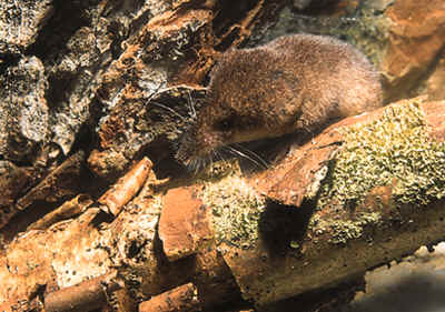 Sorex alpinus